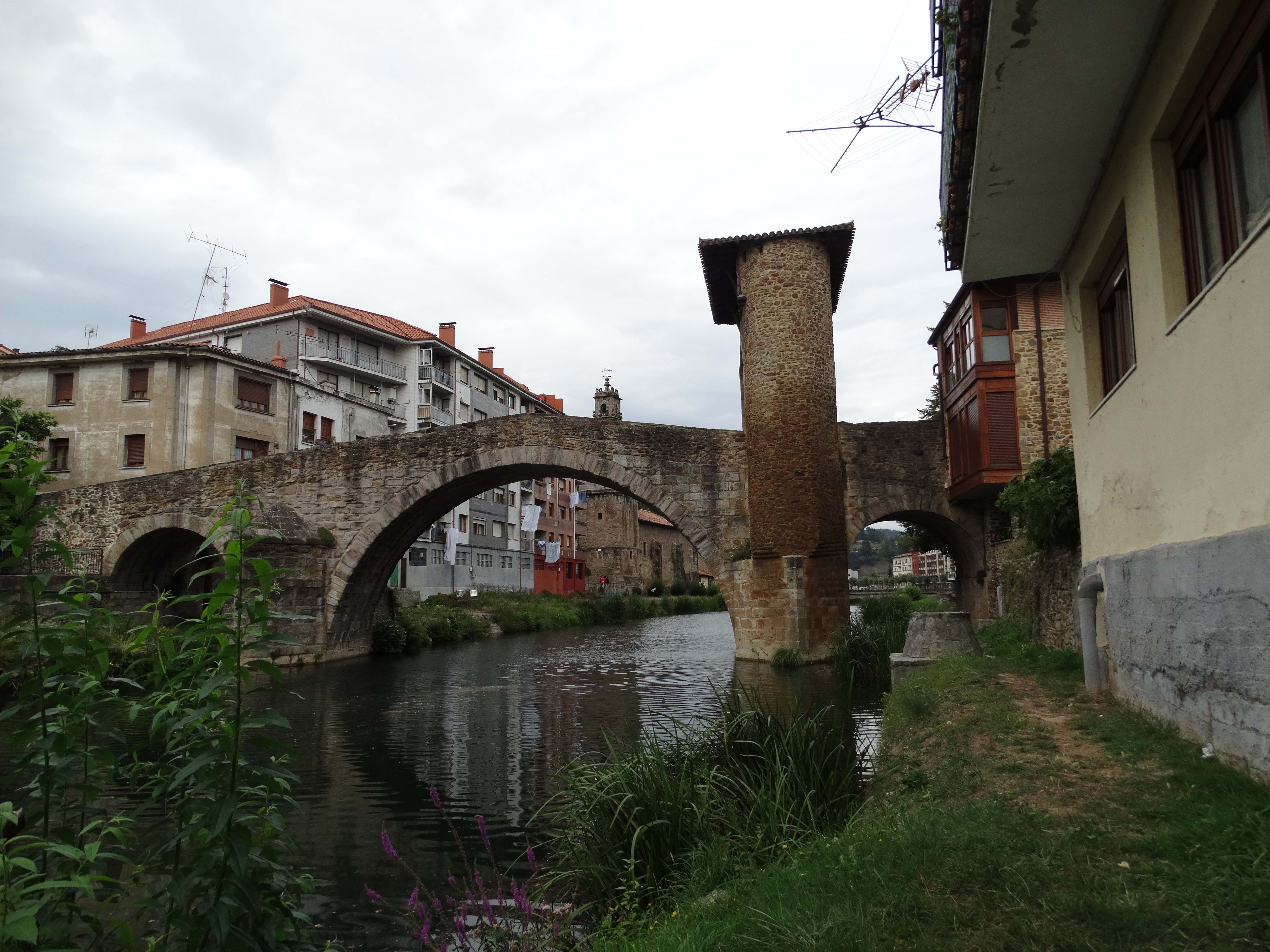 Puente medieval sobre el río Cadagua.